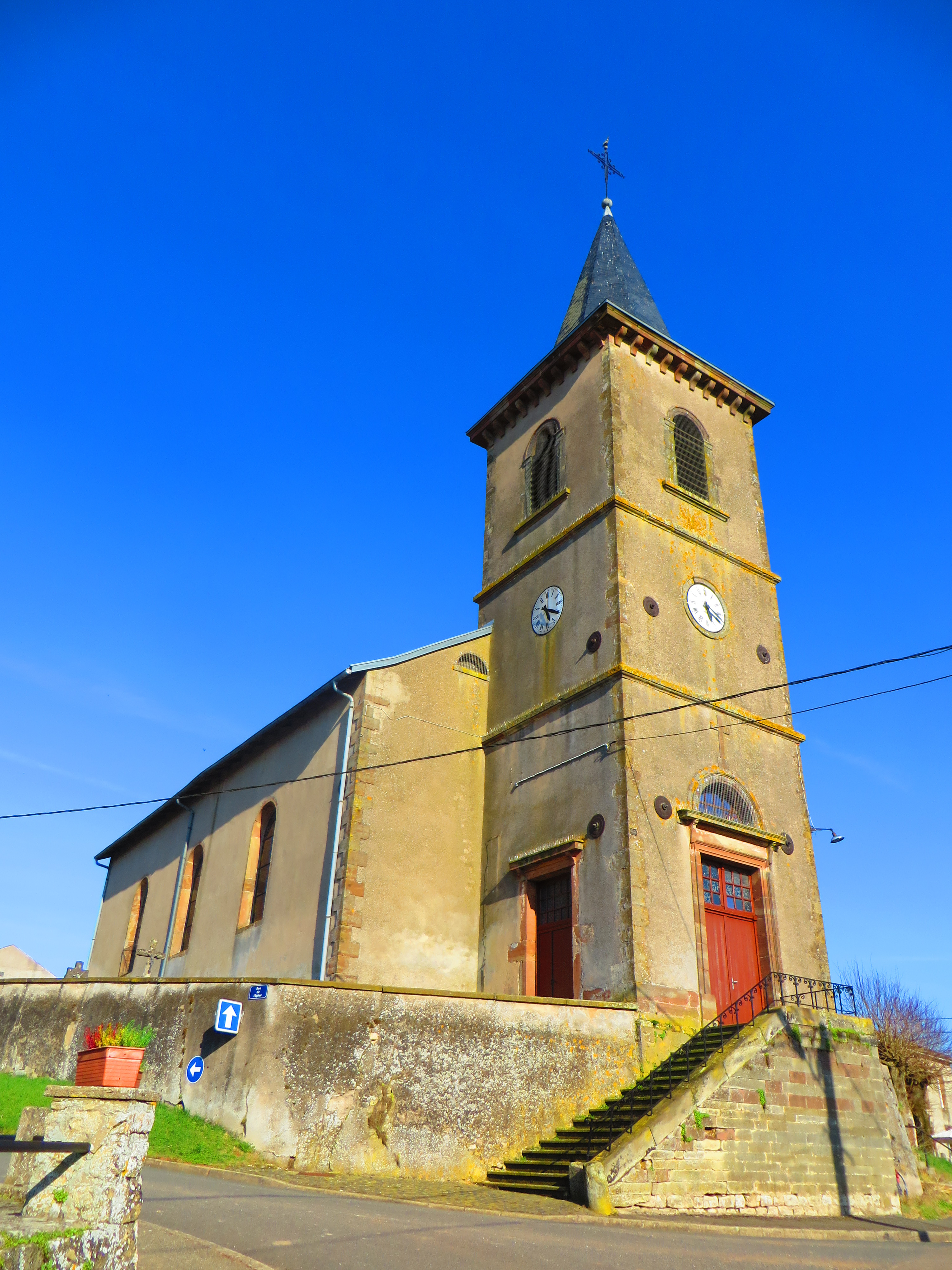 Vahl-lès-Bénestroff Église Saint-Michel